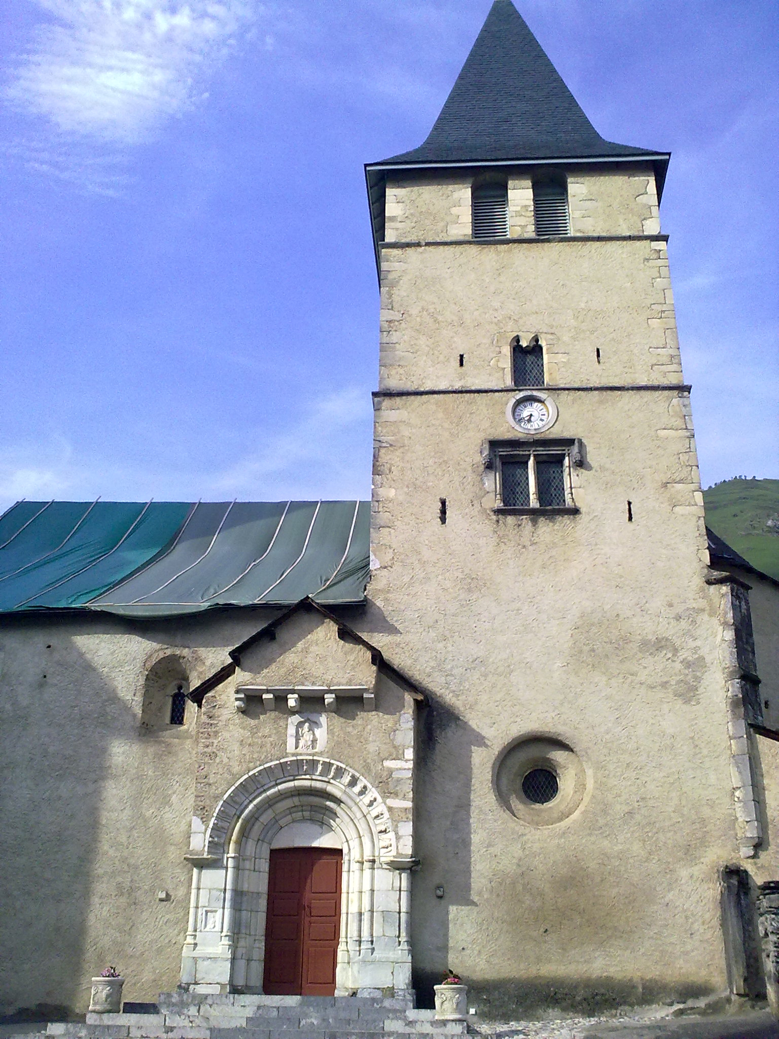 Eglise de Béost.